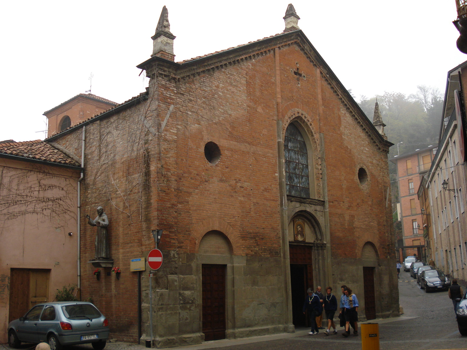 Santa Maria Canale in Tortona, Italien